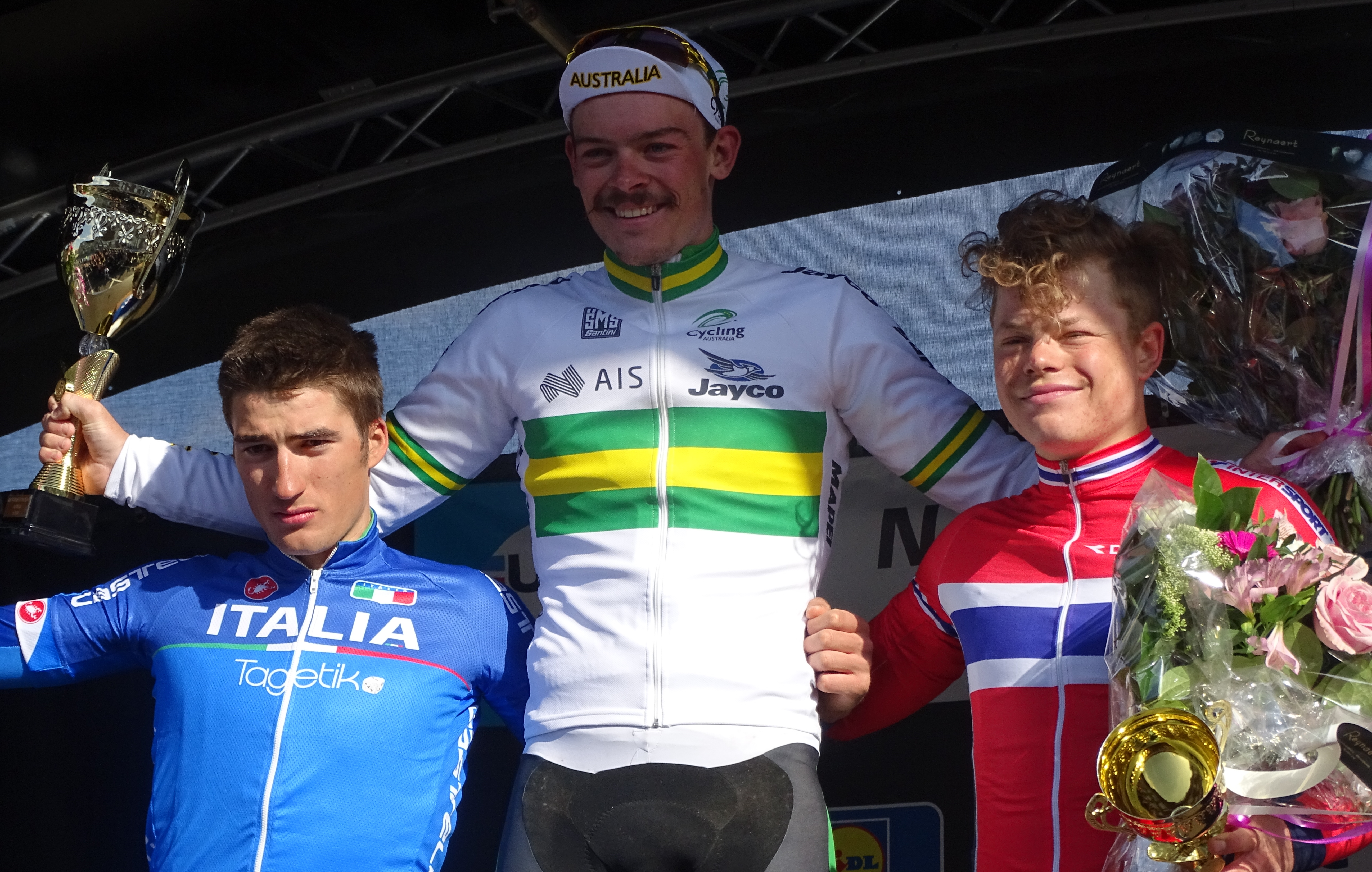 Reportage réalisé le samedi 11 avril à l'occasion du départ et de l'arrivée du Tour des Flandres espoirs 2015 à Audenarde, Belgique.